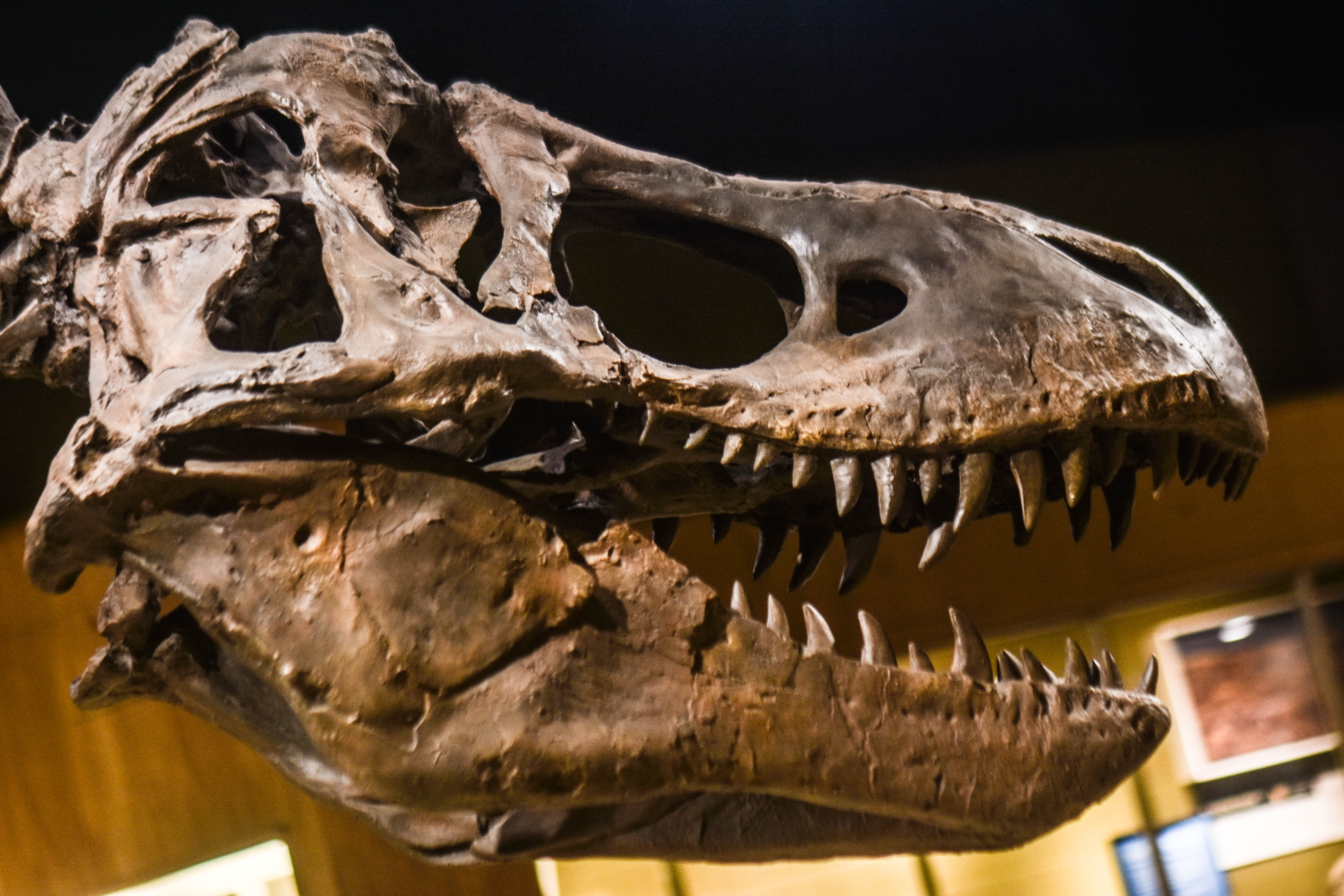 Dinosaur